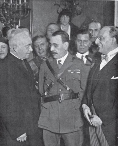 Monseñor De Andrea y Félix Uriburu, septiembre de 1930